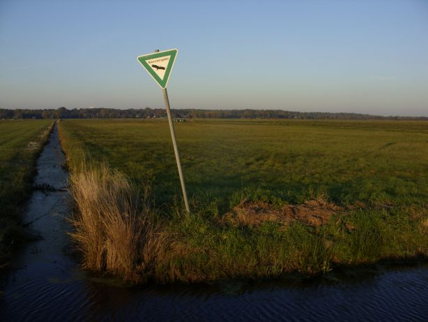 Naturschutzgebiet „Werderland“, Bremen, Grünland